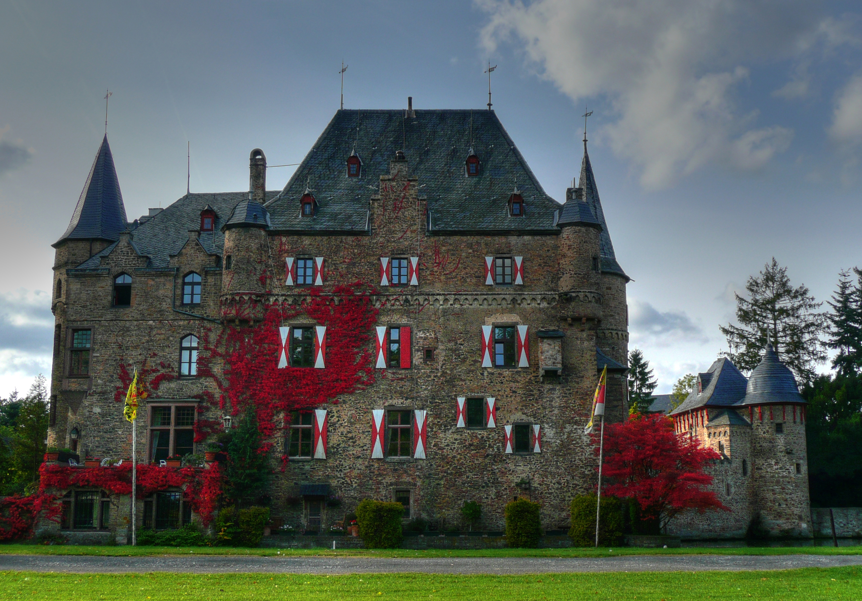 Burg Satzvey; HDR-Foto aus drei digitalen Fotografien